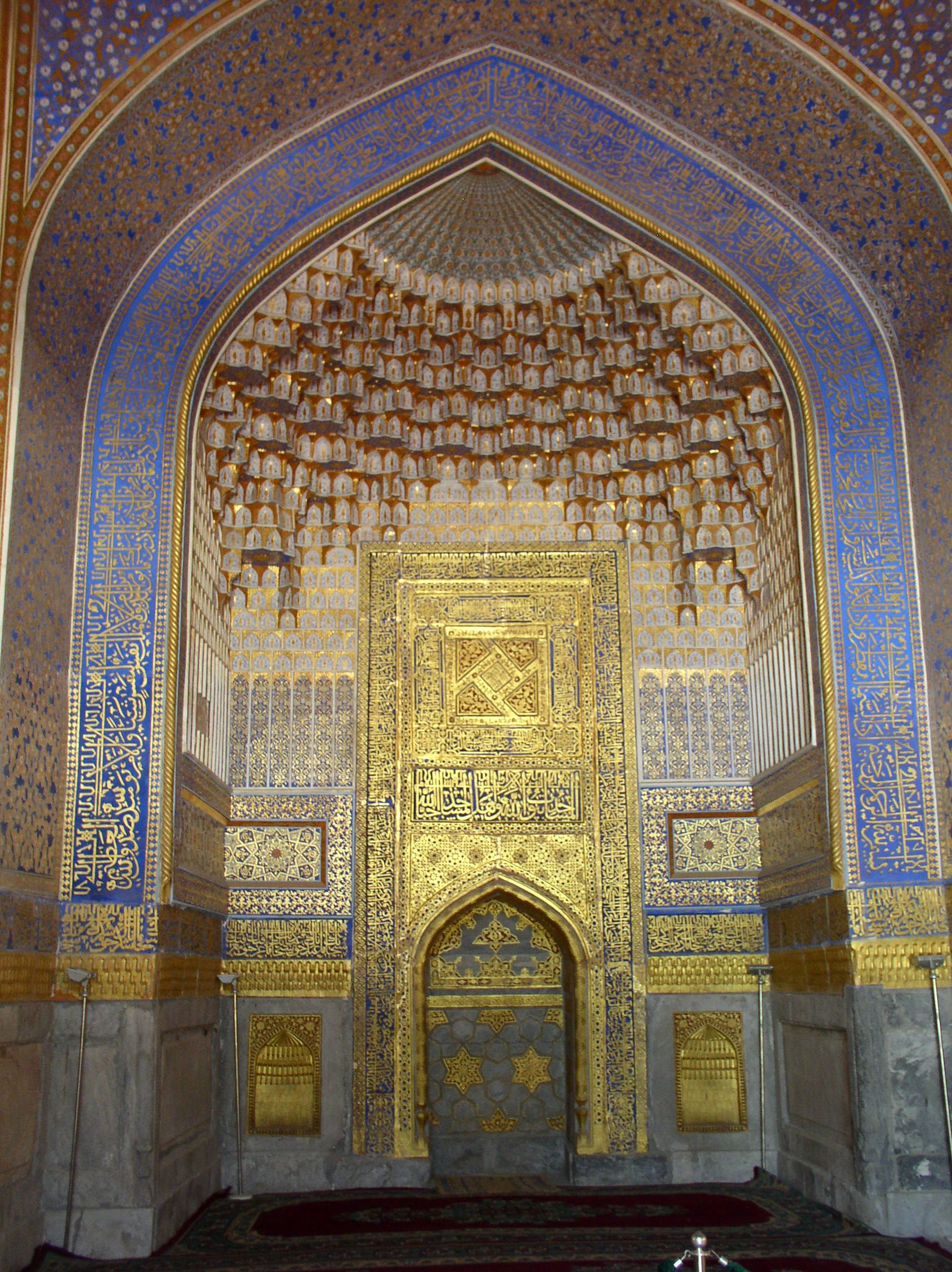 Tilla-Kori Madrassa interior, Samarqand, Uzbekistan